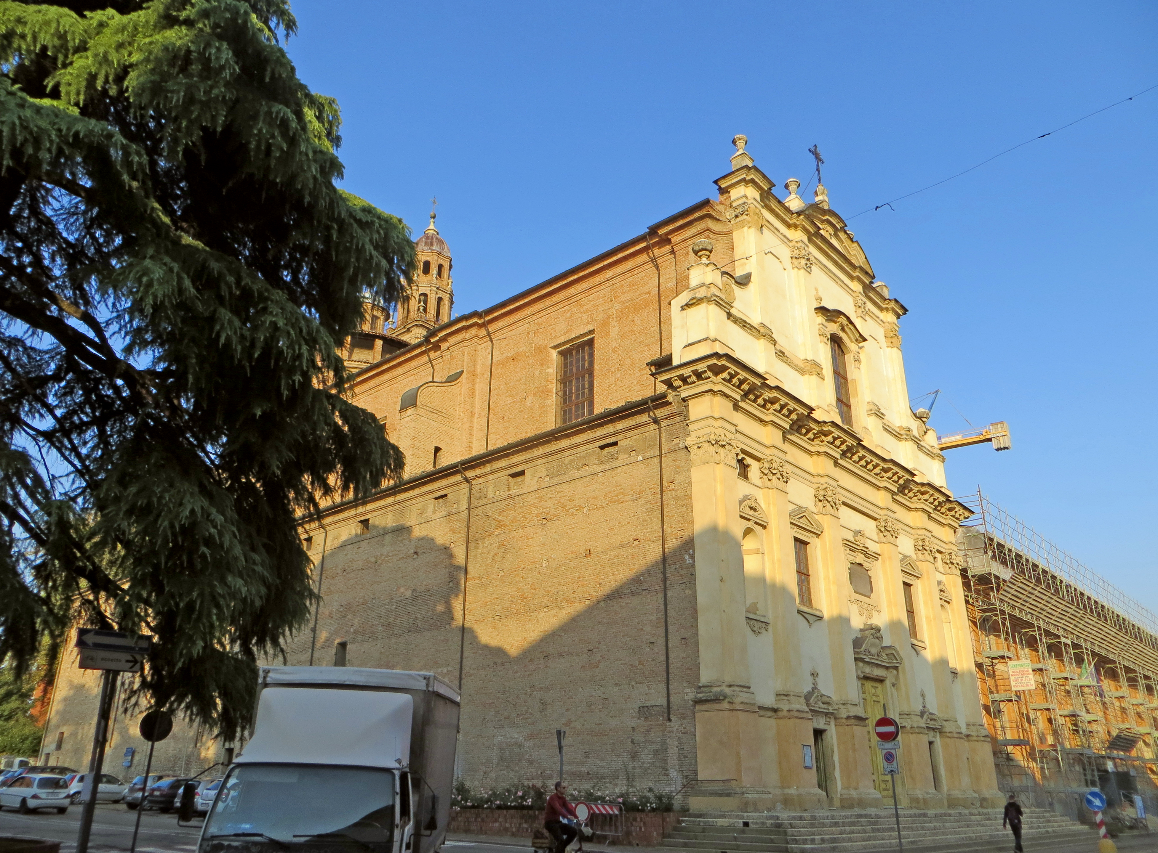 Santuario della Gran Madre di Dio (Fidenza) - facciata e lato ovest